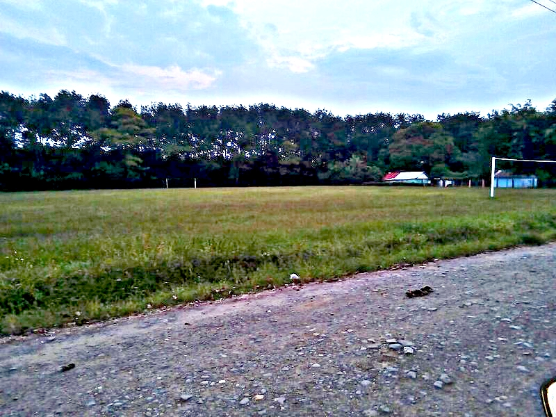 Campo deportivo en Juan de la Luz Enriquez, Jesus Carranza Veracruz